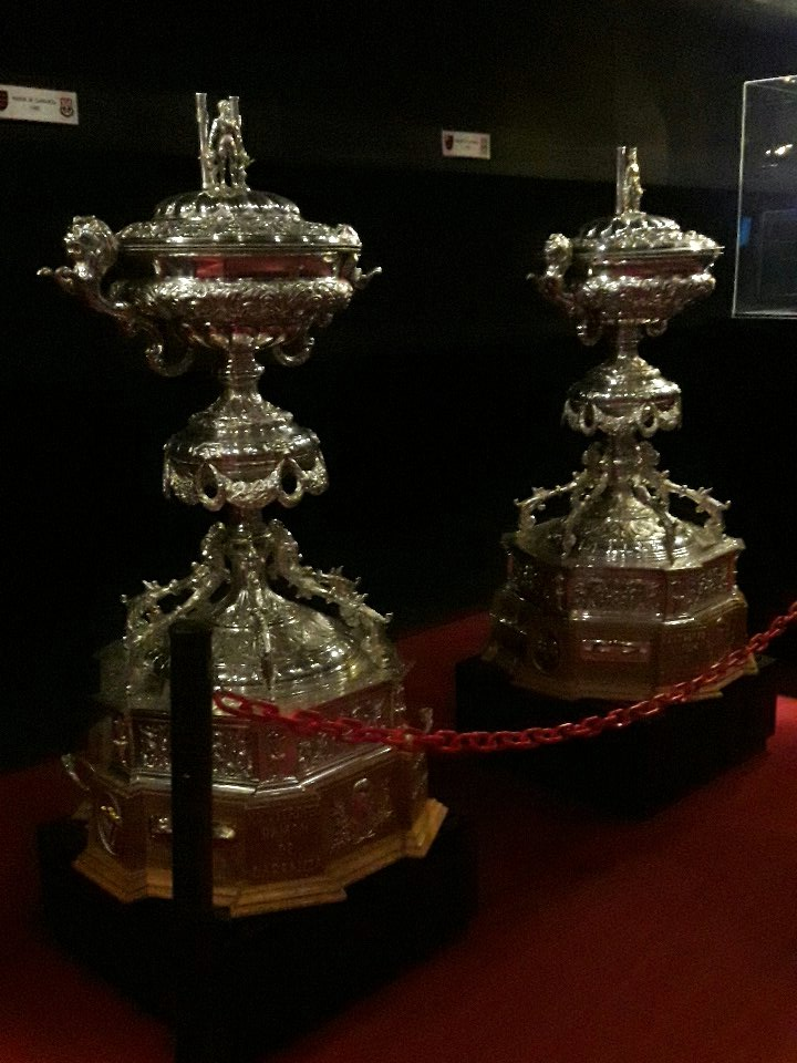 Troféu Ramón de Carranza Conquistados pelo Flamengo 1979 e 1980